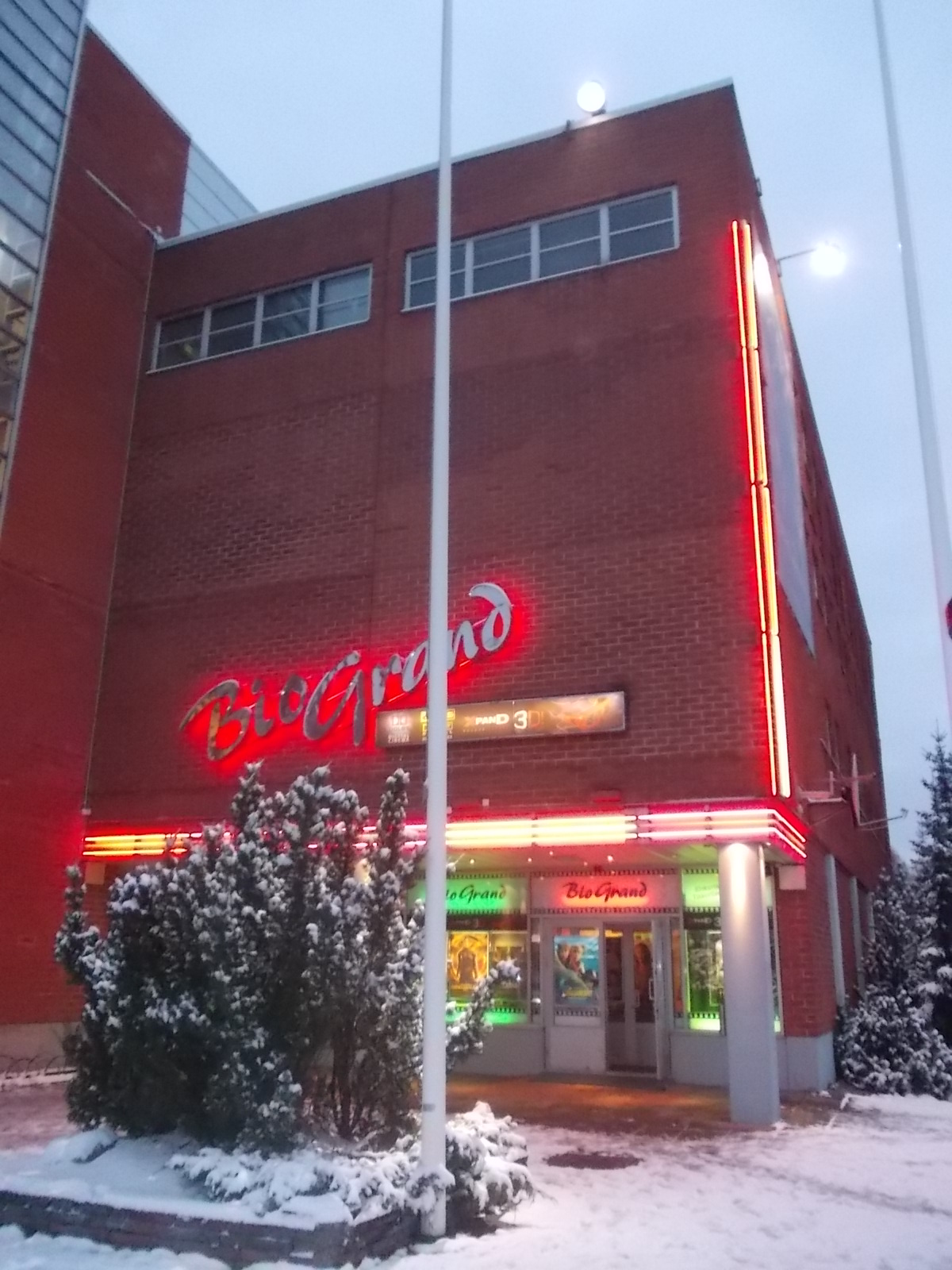 Bio Grand -elokuvateatteri Tikkurilassa, Vantaalla.